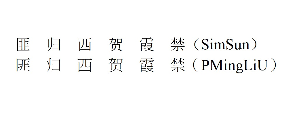 香港教育大學民主牆冒犯劉曉波夫婦的簡體字新細明體大字報，和中國大陸常用中易宋體字之差異。